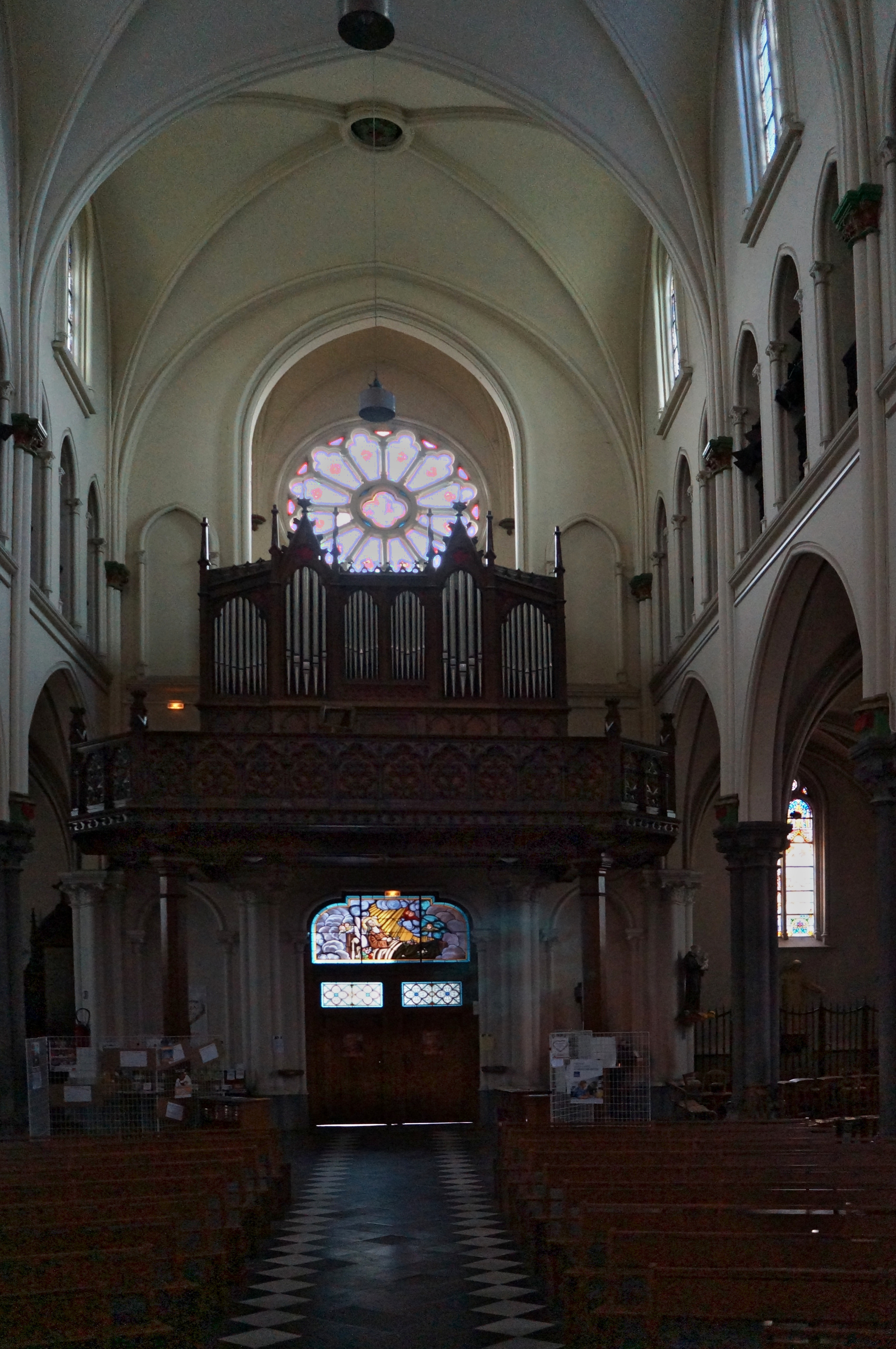 L'orgue de tribune de l'église Saint Denis d'Hellemmes Lille Nord (département français)